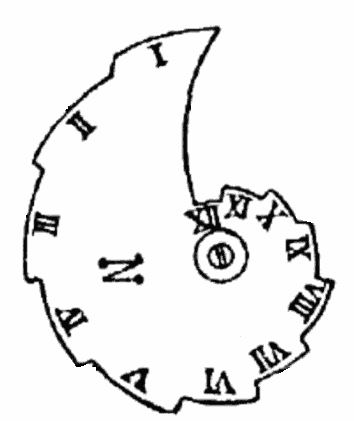 Limaçon de sonnerie à râteau